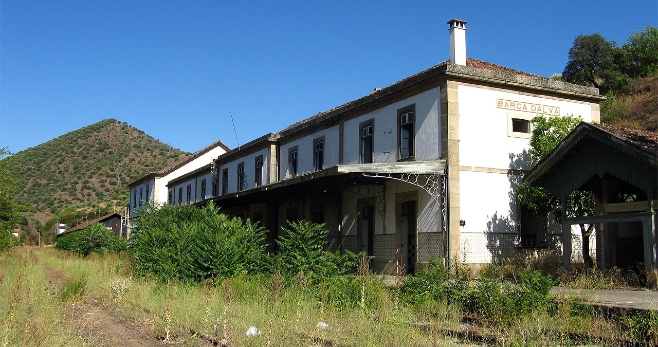 Estado da estação fronteriça